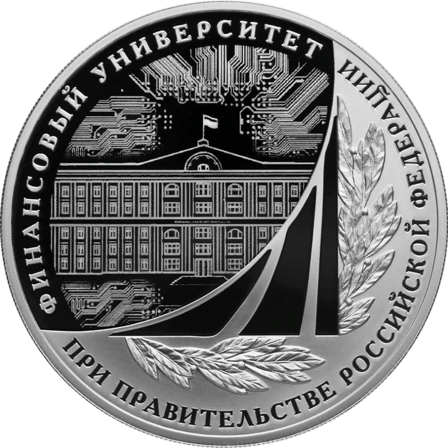 Монета Банка России, 100-летие Финансового университета. 3 рубля 2019 г., серебро, реверс, пруф. Изображения здания Финансового университета при Правительстве Российской Федерации и печатной электронной платы, а также фирменный знак университета и рельефное изображение лавровых листьев; вдоль канта — надпись: «ФИНАНСОВЫЙ УНИВЕРСИТЕТ ПРИ ПРАВИТЕЛЬСТВЕ РОССИЙСКОЙ ФЕДЕРАЦИИ». Чеканка — Санкт-Петербургский монетный двор. Художник: Е.В. Крамская. Скульптор: компьютерное моделирование.